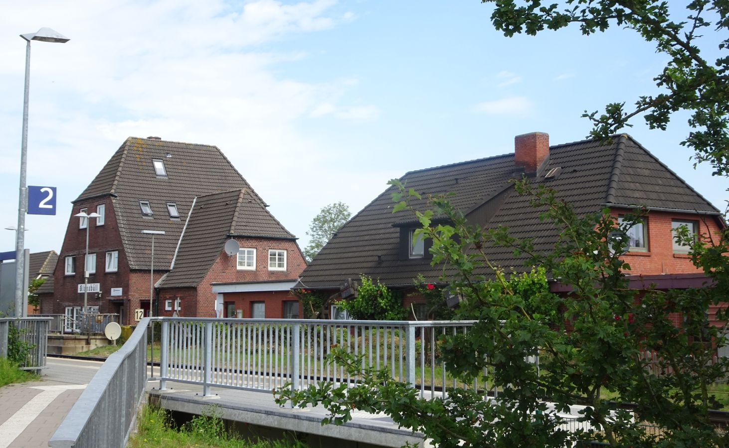 Bahnhof Klanxbüll